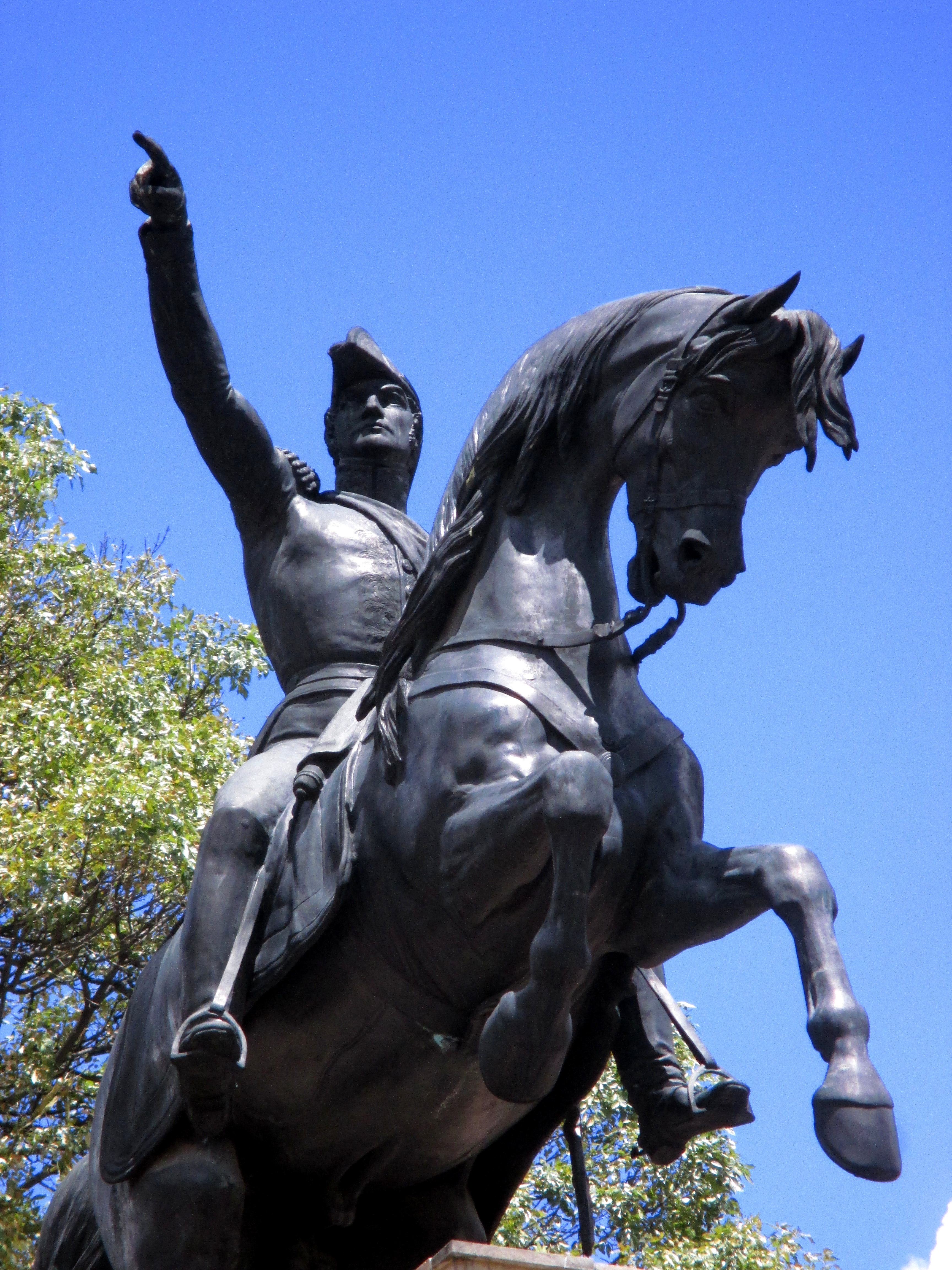 Bogotá escultura, San Martín, cr 7 cl 29